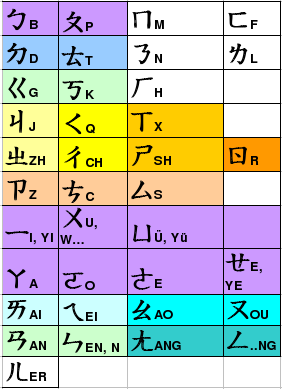 Zhuyin, selfmade